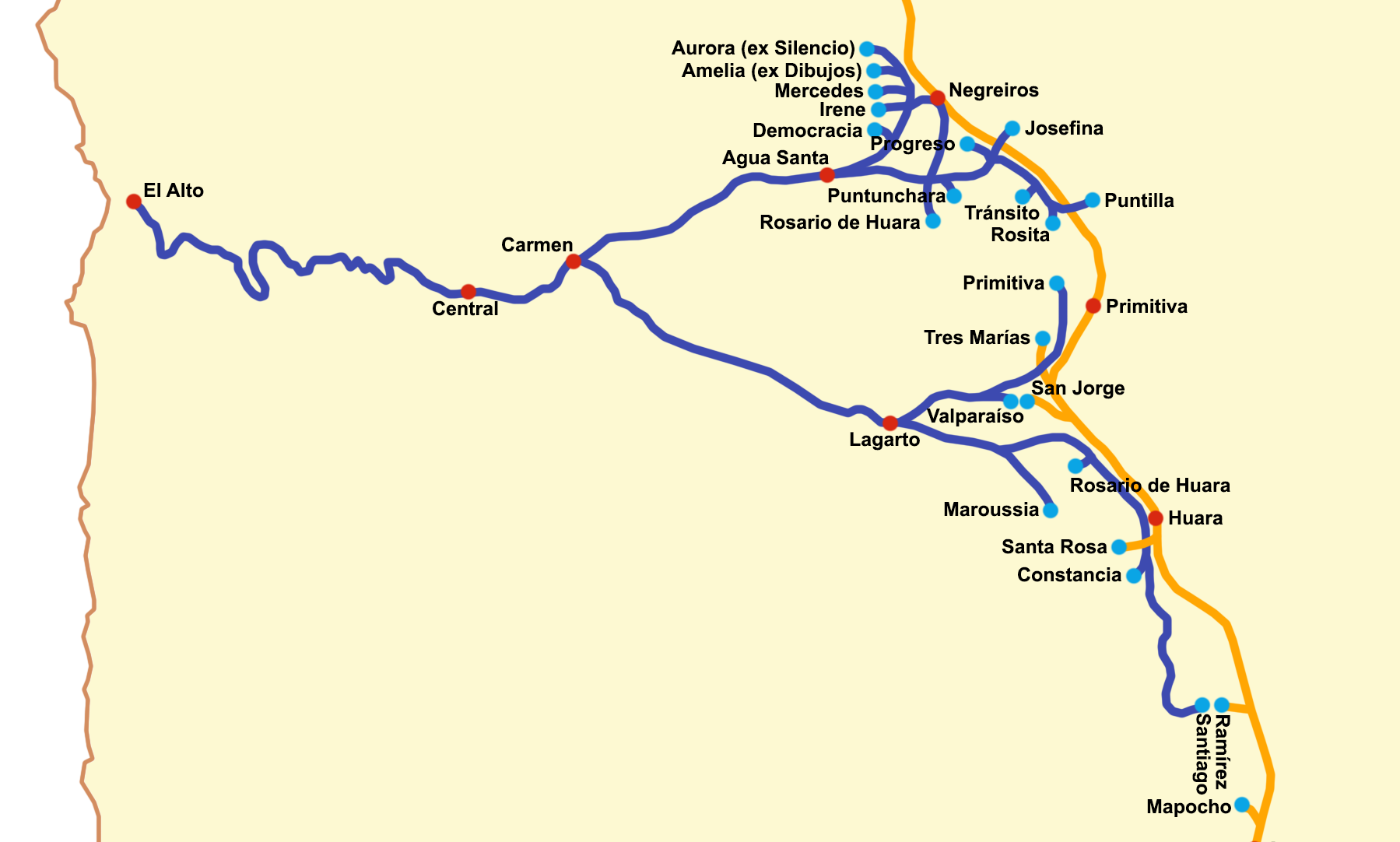 Mapa del trazado del Ferrocarril de Agua Santa (en color pùrpura) hacia 1920. Las oficinas salitreras aparecen marcadas en celeste y las estaciones en rojo, mientras que la línea naranja corresponde al Ferrocarril Salitrero de Tarapacá.